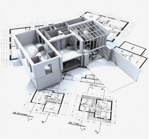 arquitetura